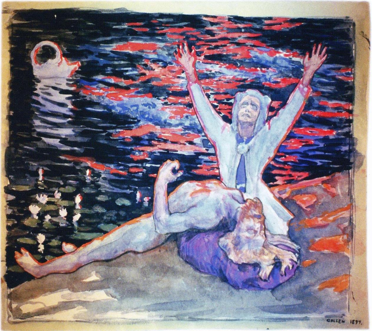 Lemminkäinen Tuonelassa, Axel Gallénin luonnos maalausta Lemminkäisen äiti varten. Kuuluu yksityiskokoelmaan.